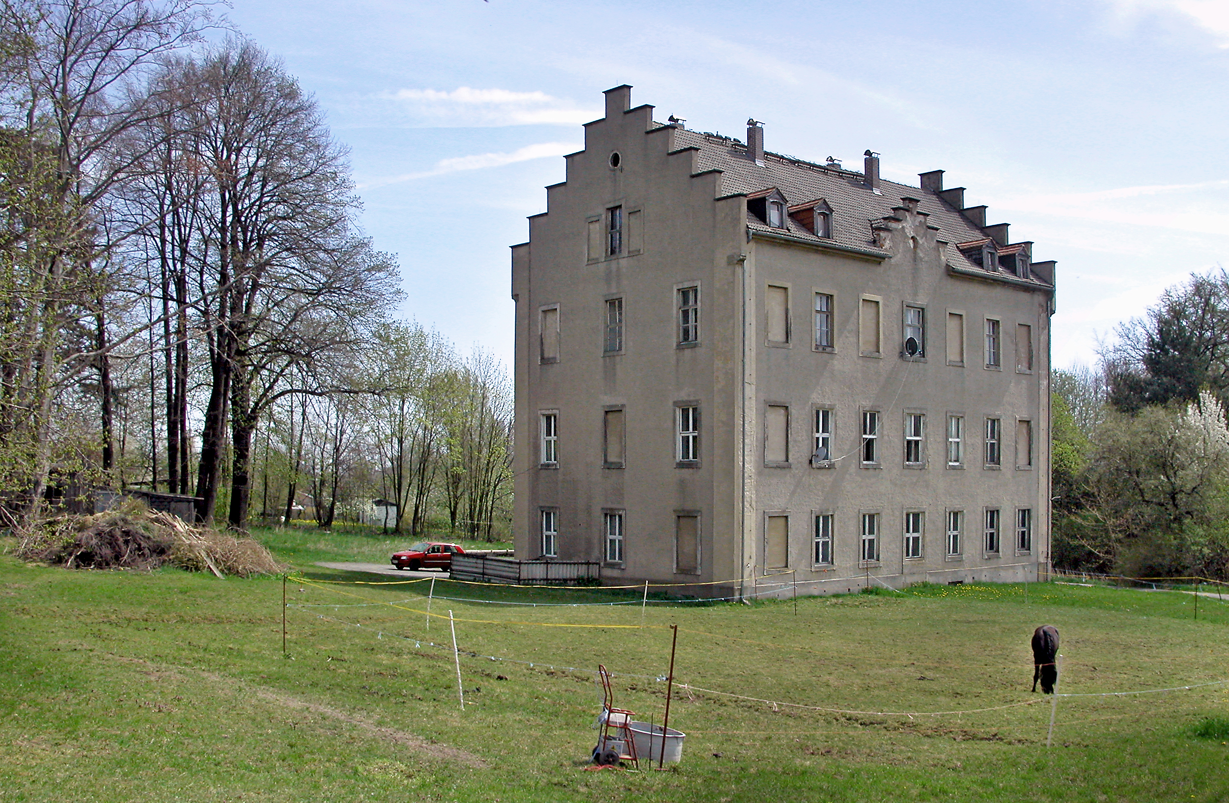 28.04.2008 02747 Ruppersdorf (Herrnhut), Hofeweg 2 (GMP: 50.999579,14.711640): Schloß Oberruppersdorf, im frühen 18. Jh. errichtet, 1873 von Dr. Erwin von Mayer aufgestockt. Nach 1945 Mehrfamilienhaus. [DSCN32515.TIF]20080428415DR.JPG(c)Blobelt